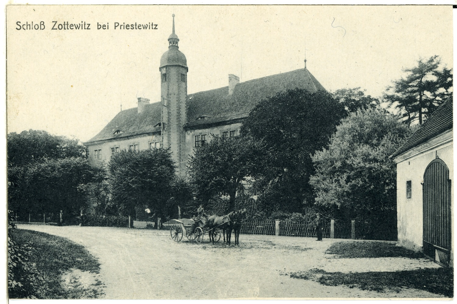 Zottewitz; Schloß This postcard is from publisher Brück & Sohn in Meißen ( postcard has a unique number 01333 and is available in a higher resolution at the publisher. This images was uploaded in a cooperation project between Wikipedians and the publisher.